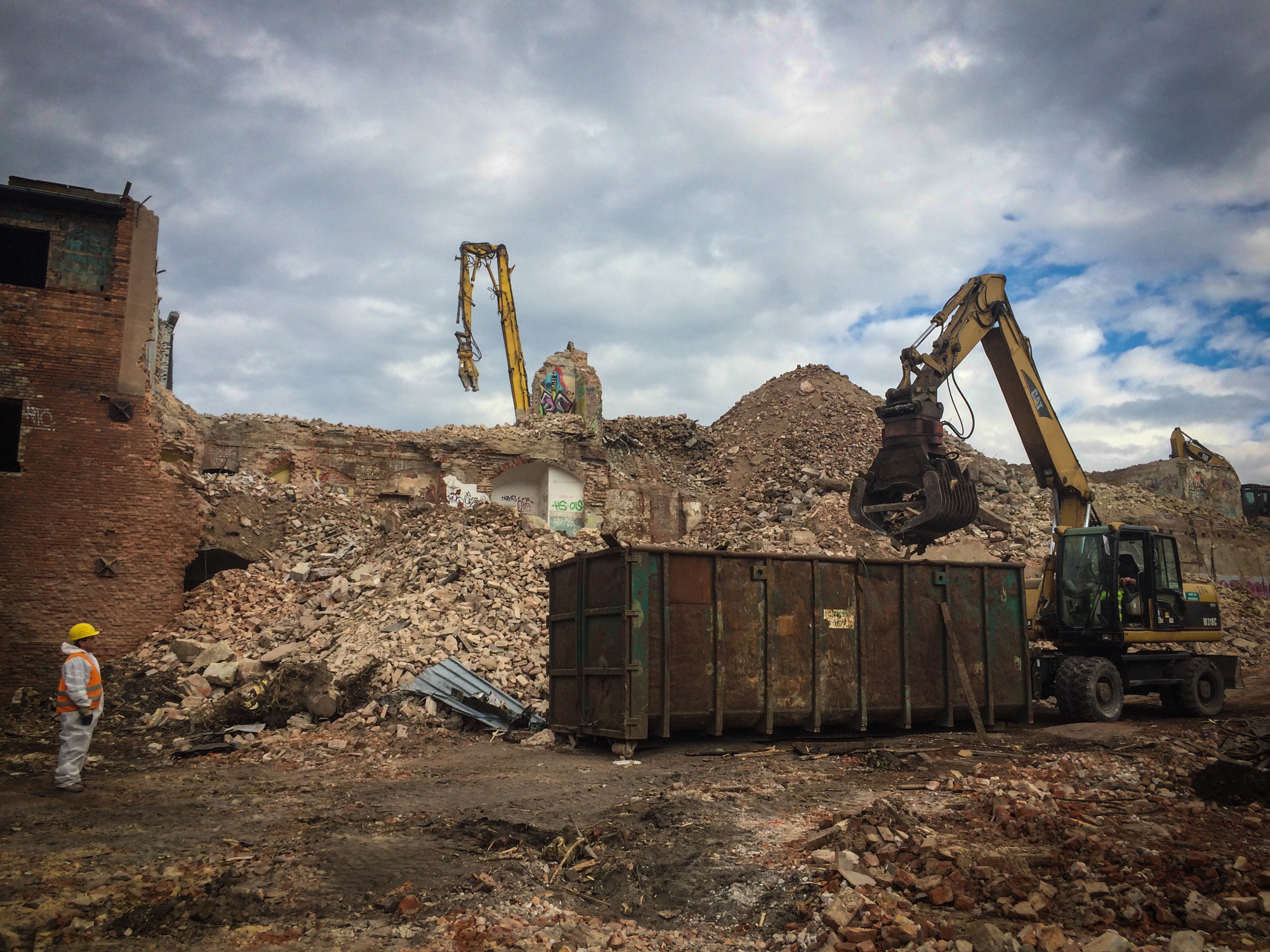 Böhmisches Brauhaus Berlin: Abriss im April 2015 (Foto freigegeben durch